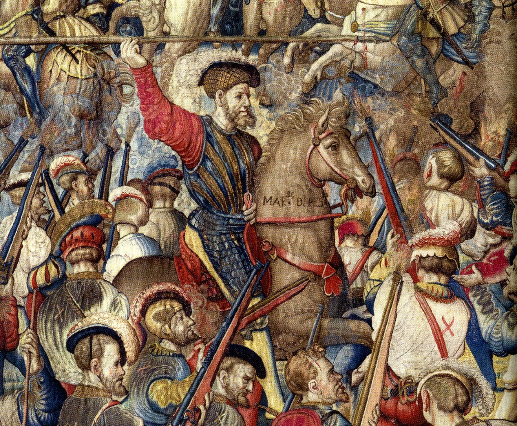 Arazzi Battaglia di Pavia - Francesco Ferdinando d'Avalos (detto Ferrante), Marchese di Pescara